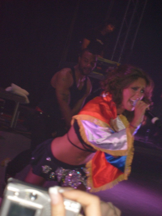 Анаи огрнута српском заставом.